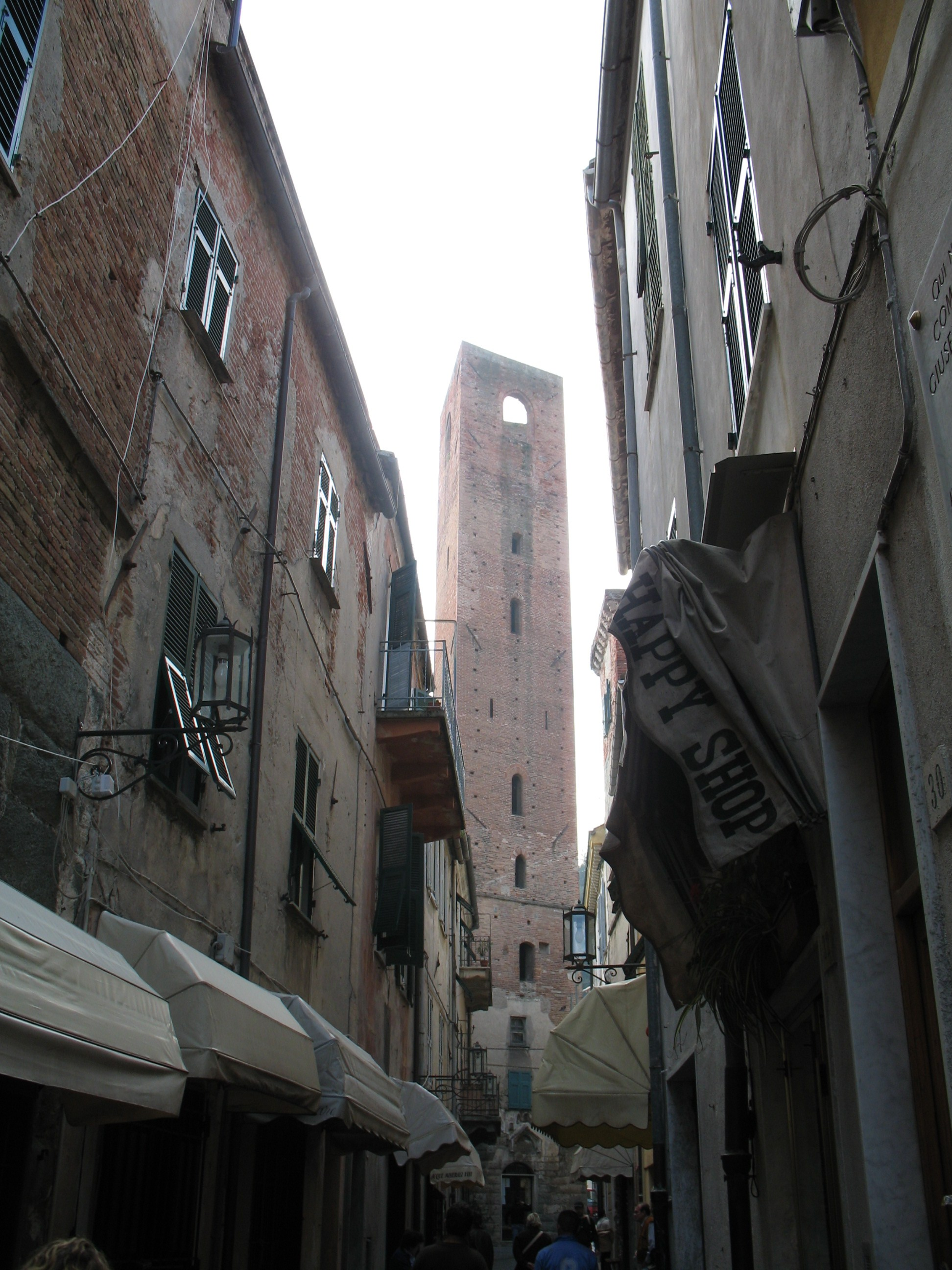 Serie di Immagini da Noli in provincia di Savona